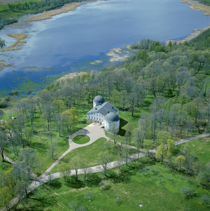 Slottet i bildens mitt, upptill Väsbysjön. Motiv: Penningby slott Nyckelord: Byggnadsminnen, Flygbilder Kategori: Herrgårds-/slottslandskap, Insjömiljöer Slottet i bildens mitt, upptill Väsbysjön.